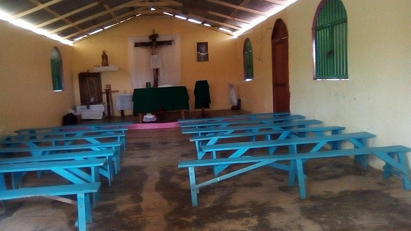 Adolfo Lopez Mateos (zacatal) Jesus carranza